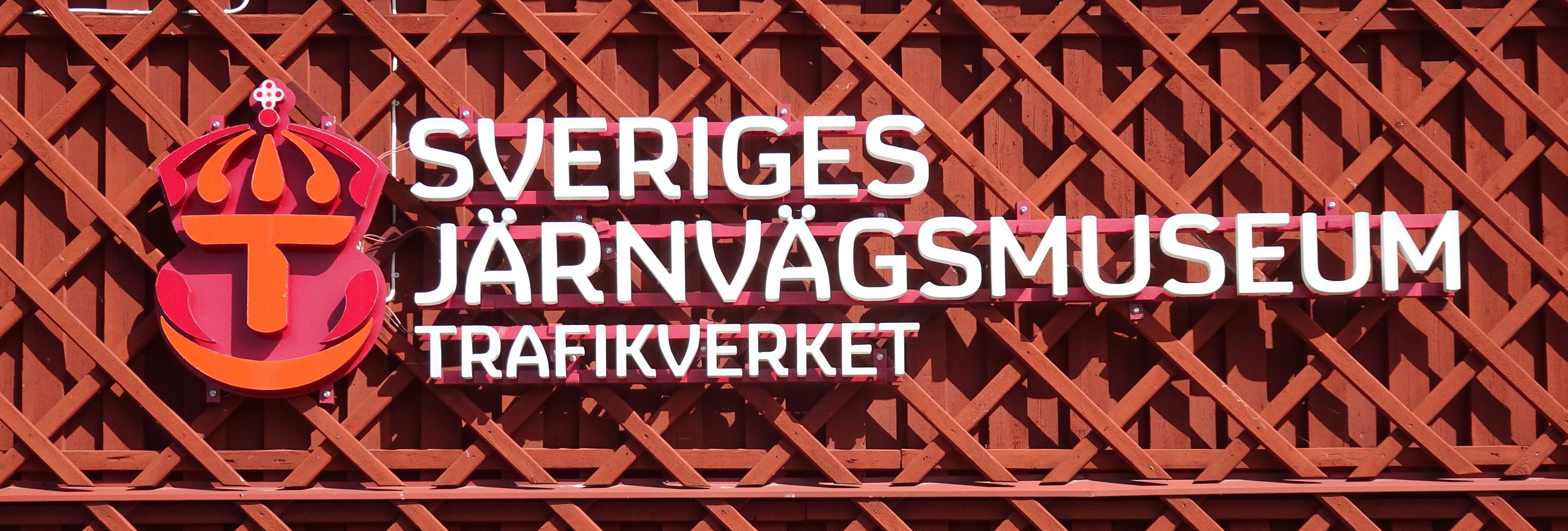 Sveriges Järnvägsmuseum Entréskylt